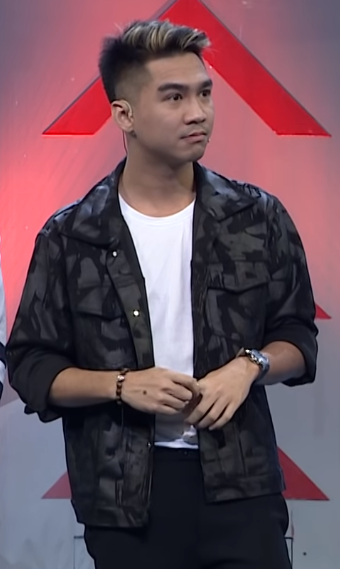 Bộ 3 Siêu Đẳng - Pewpew bị Thanh Duy bóc mẽ, reaction mà soi cả lông nách - Off Show Tập 12 PewPew, cắt xén từ ảnh chụp màn hình video của BEE Entertainment / Giải Trí